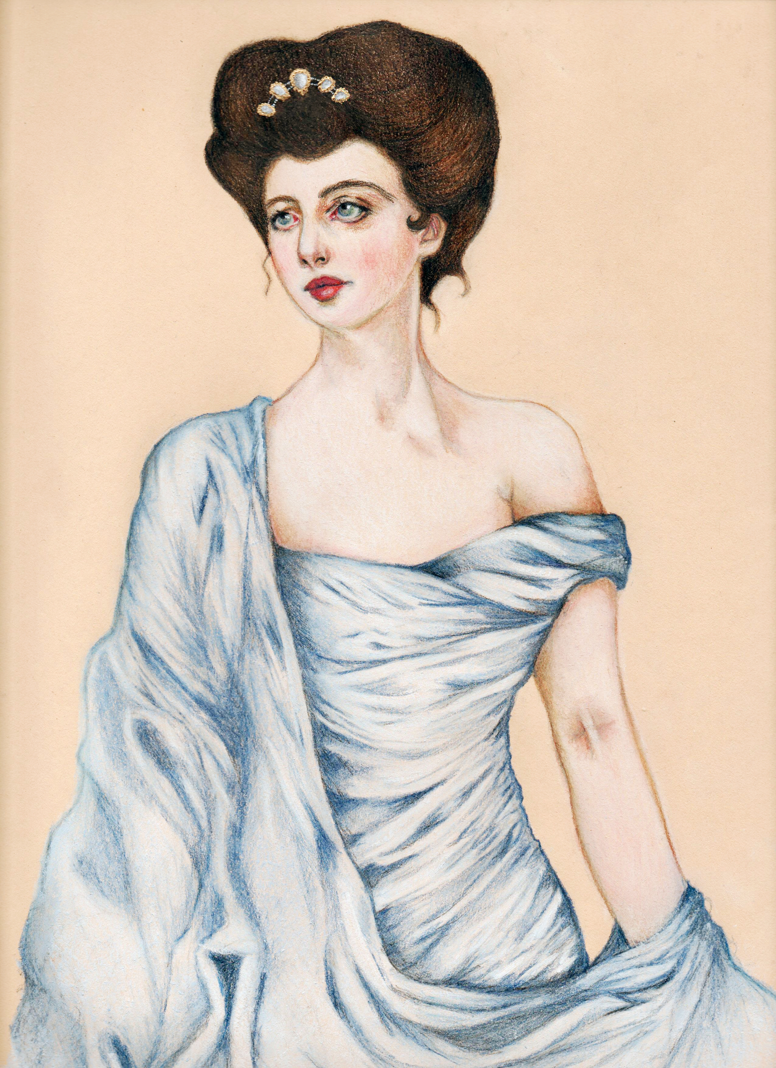 Illustrazione Franca Florio